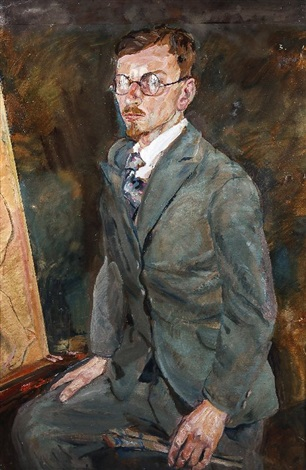 Hubert Rüther Portrait des Malers Conrad Felixmüller